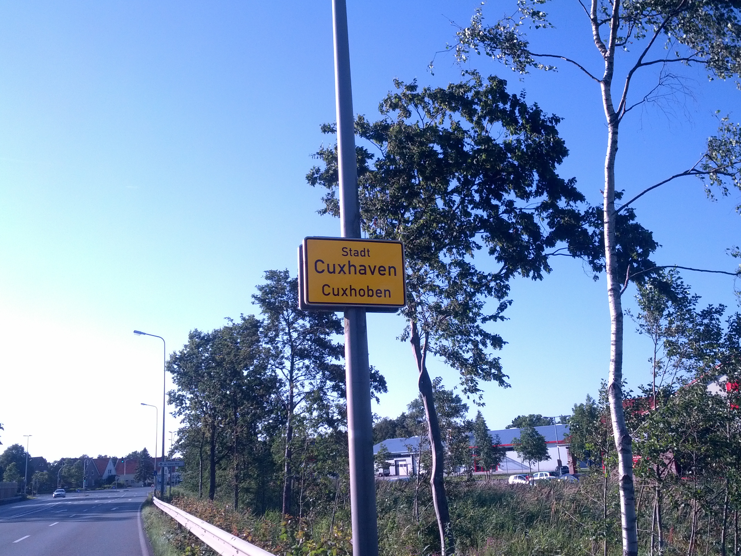 Oortsschild von Cuxhoben, Landkreis Cuxhoben, mit den Naam op Hoochdüütsch un op Plattdüütsch